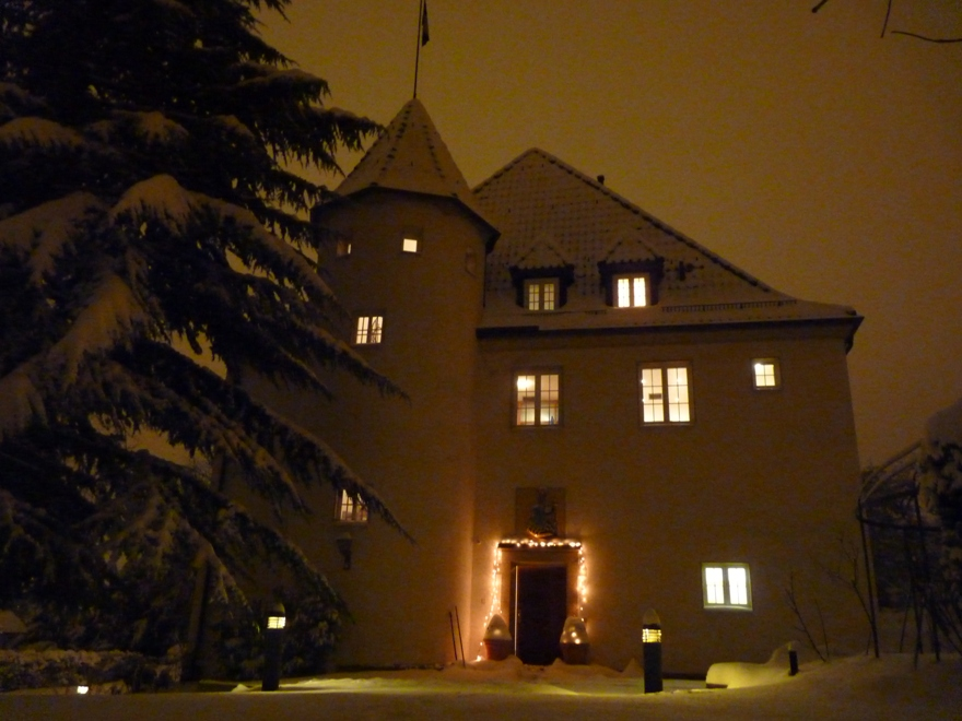 Corphaus Corps Stauffia 1